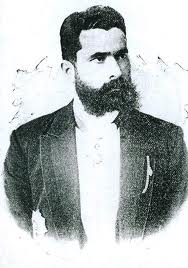 Đorđe Genčić, srpski političar